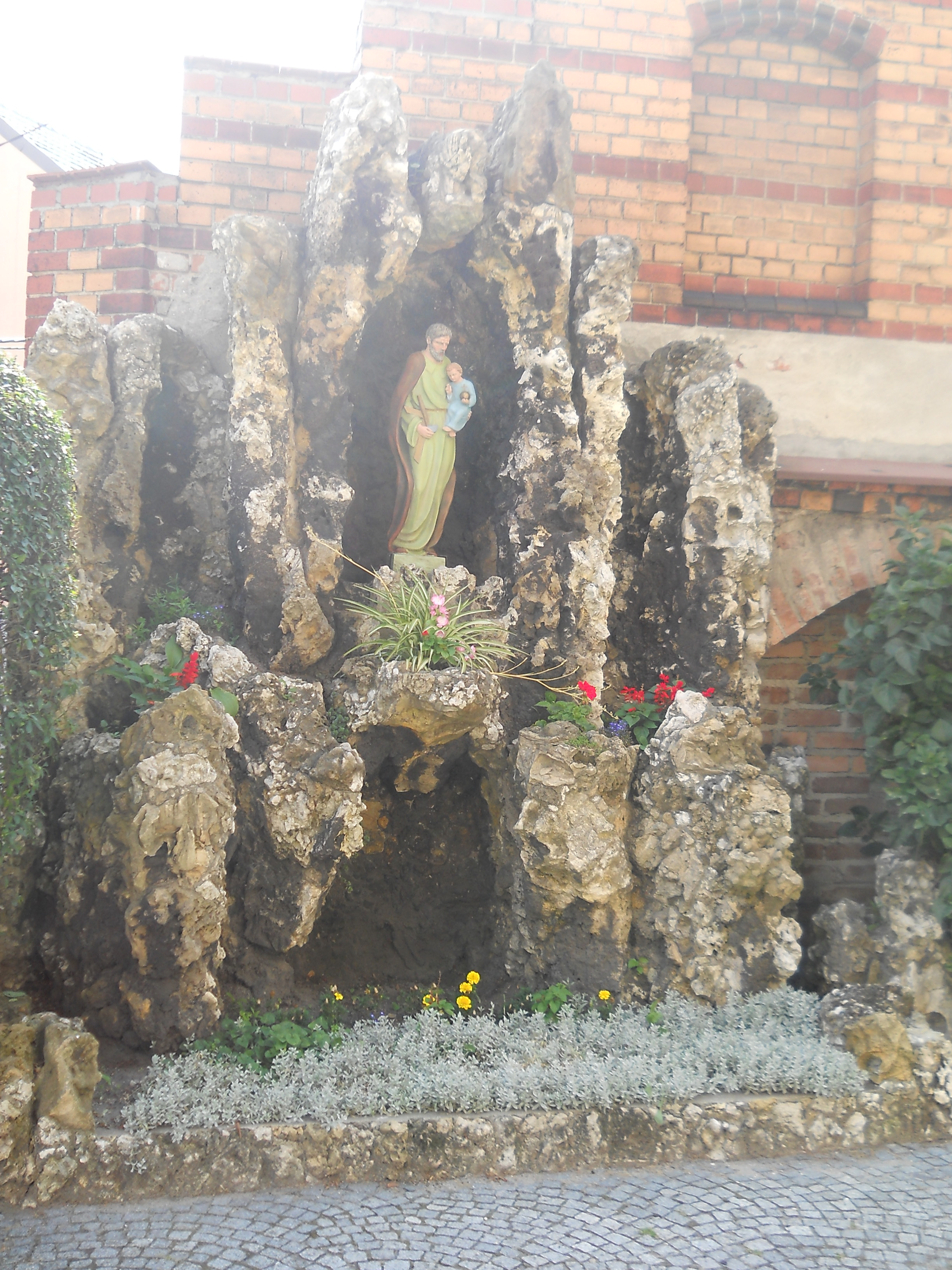 kościół par. p.w. św. Mikołaja - grota przykościelna. Pyskowice, ul. Poniatowskiego